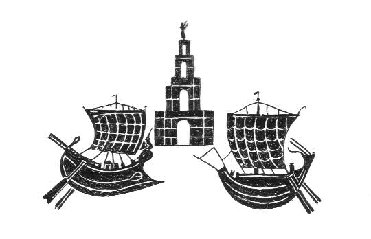 Dos naves onerarias en el mosaico de Ostia